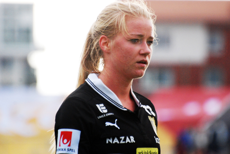 a_77_0119